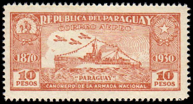 Sello de la Republica de Paraguay, Correo Aereo, "Paraguay" que esta una cañonera de la Armada Nacional, 1931.